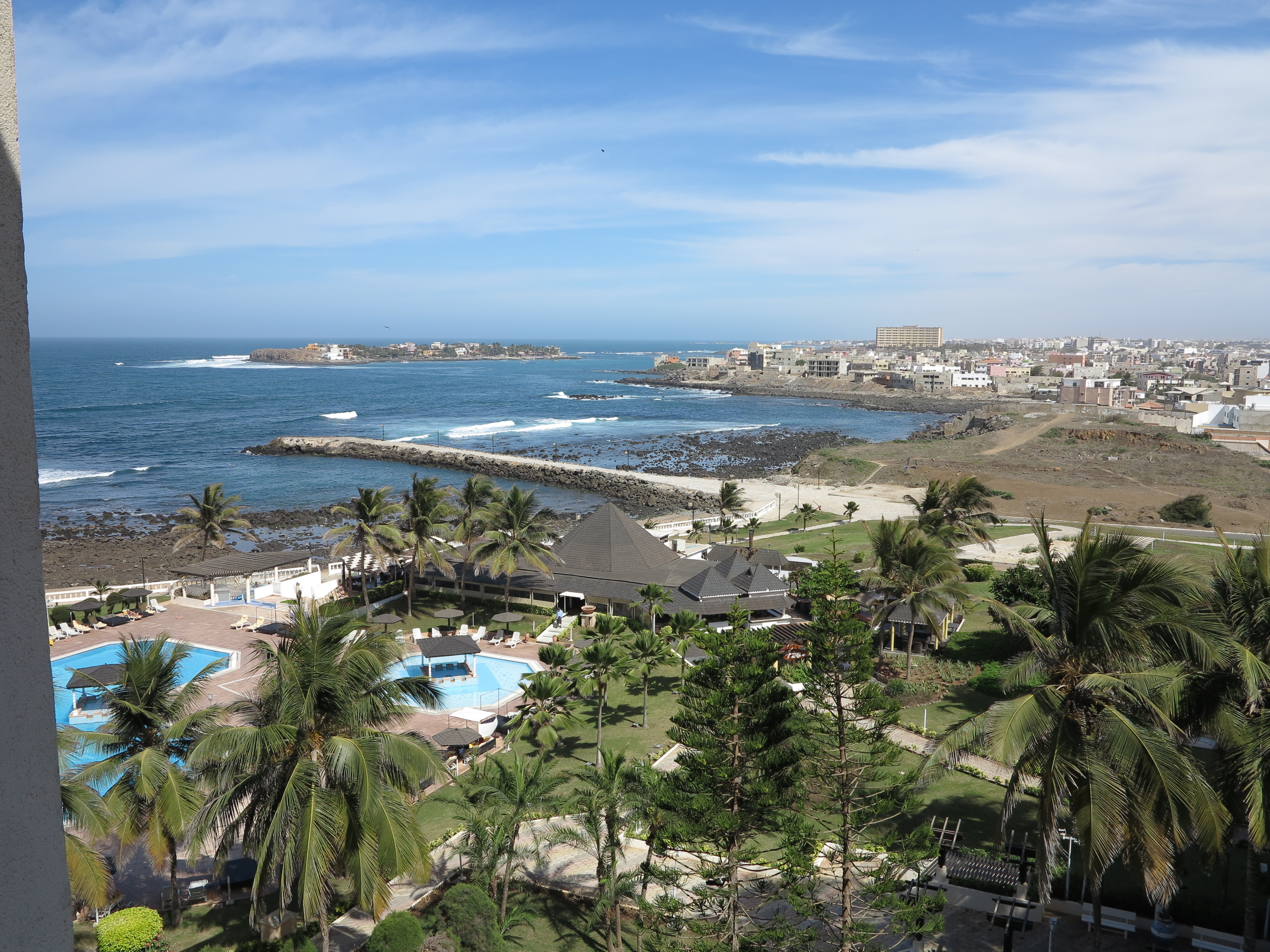 LES ALMADIES.DAKAR.SENEGAL